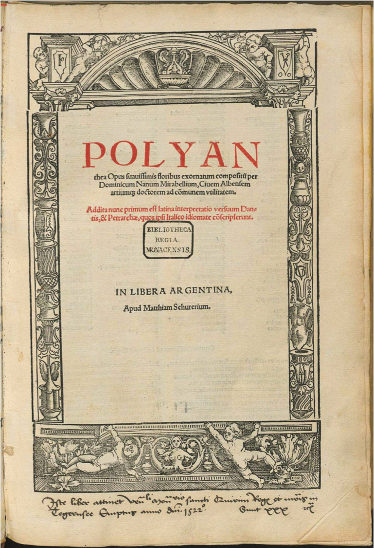 Couverture de Polyanthea. Strasbourg. Mathias Schurer 1517